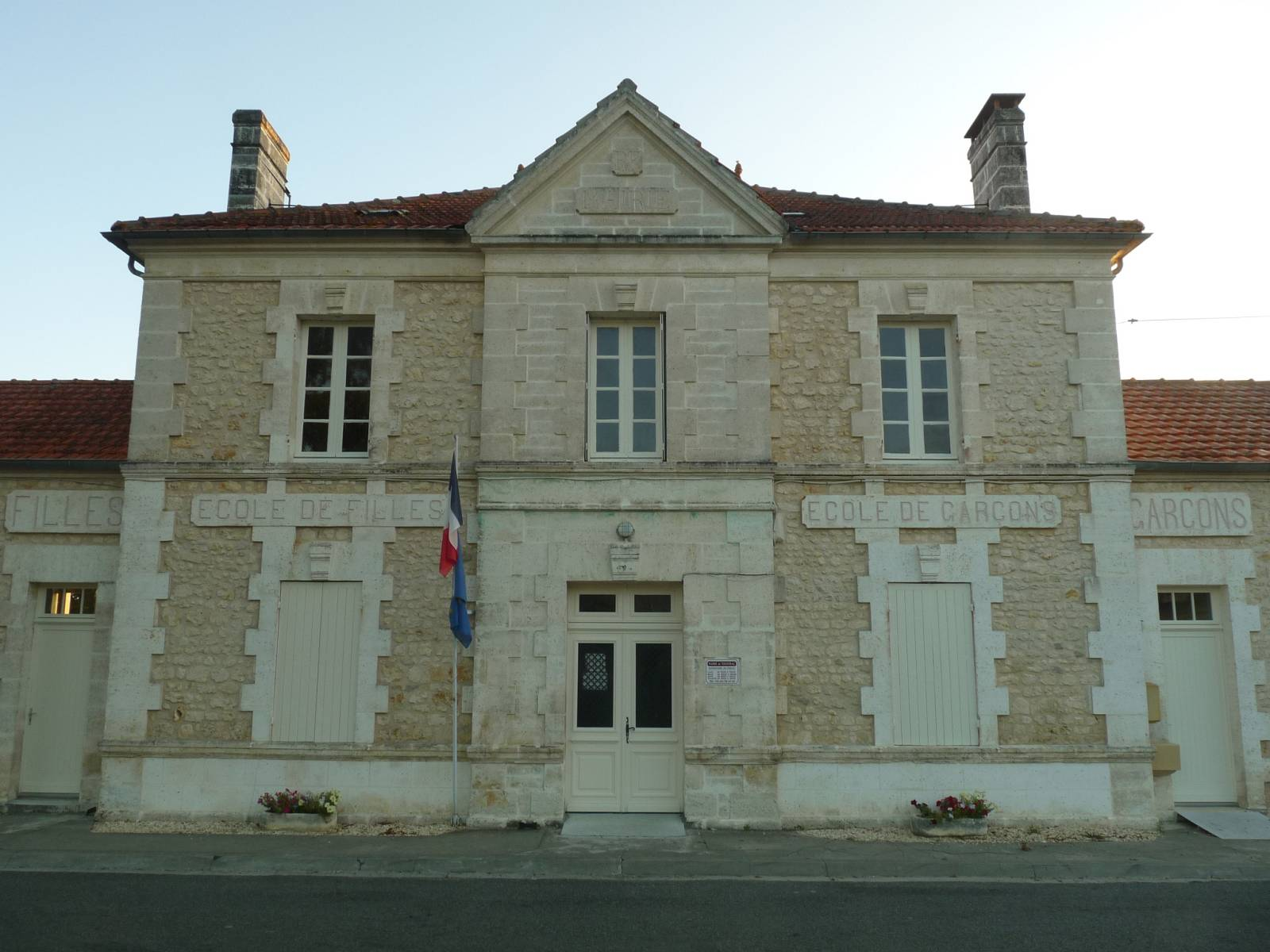 mairie de Touvérac (16), France